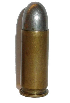 .38 ACP cartridge